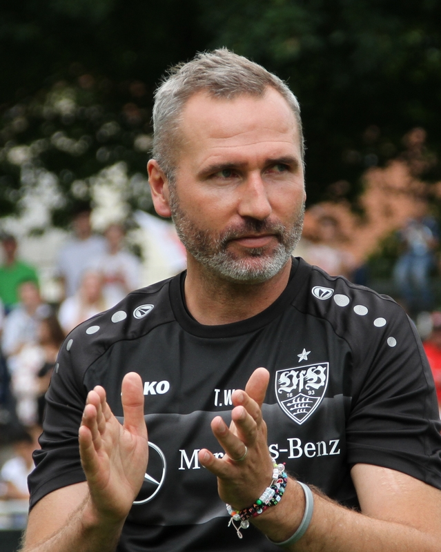 Tim Walter beim Trainingsauftakt 2019. Aufgenommen von